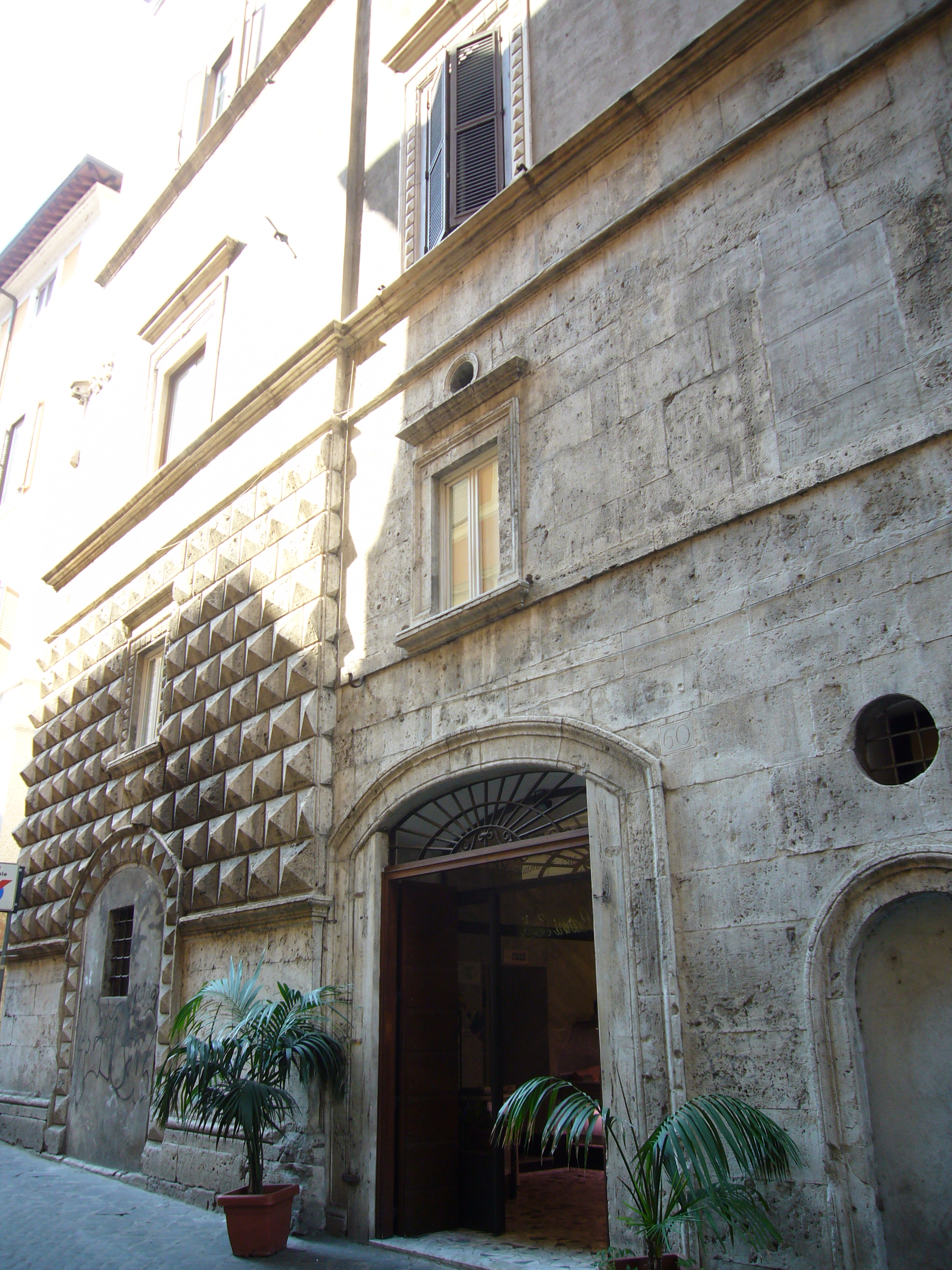 Roma, palazzo Santacroce Publicola, facciata su via di Santa Maria del Pianto